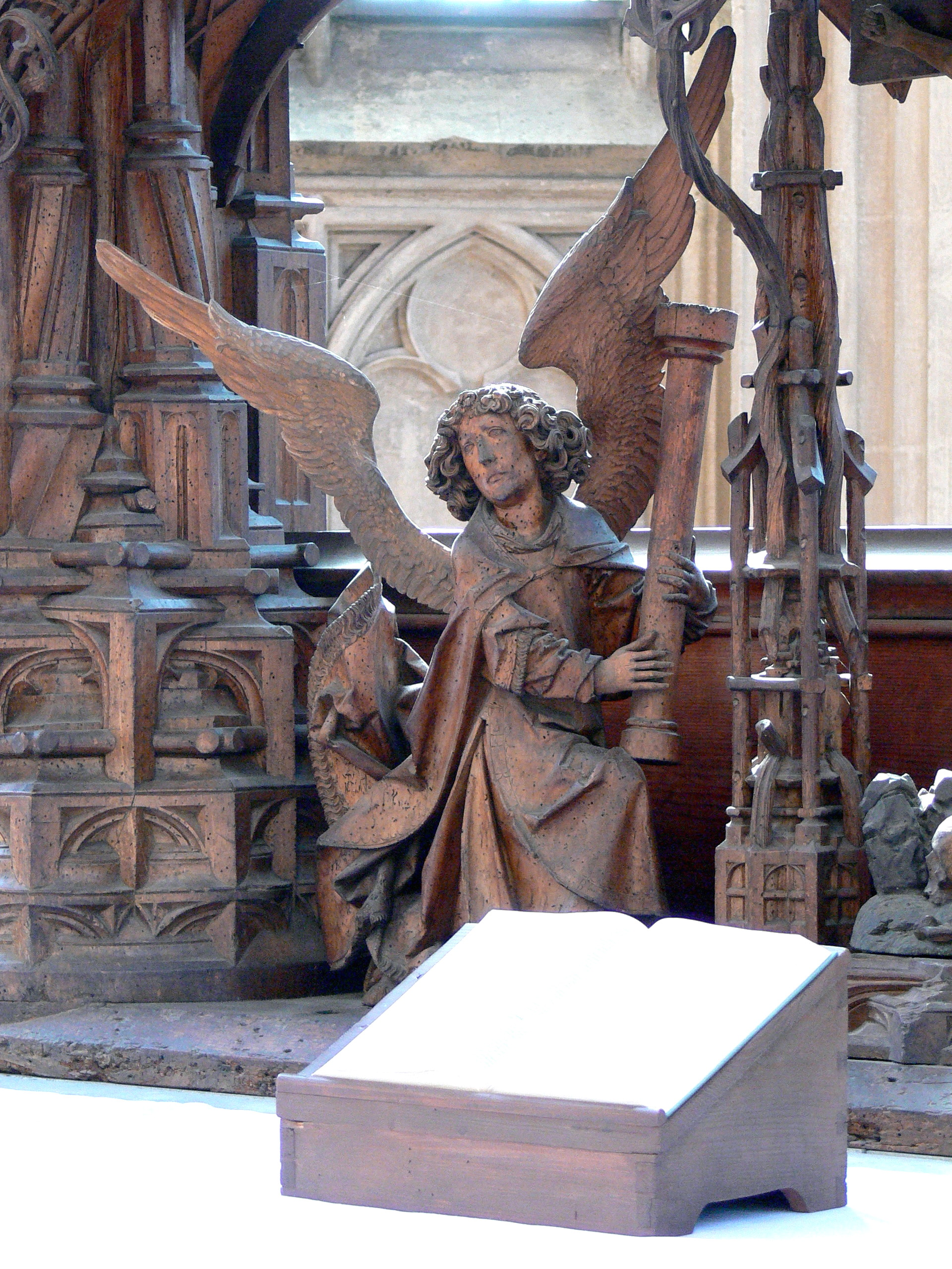 Heilig-Blut-Altar in St.Jakob in Rothenburg. Leuchterengel